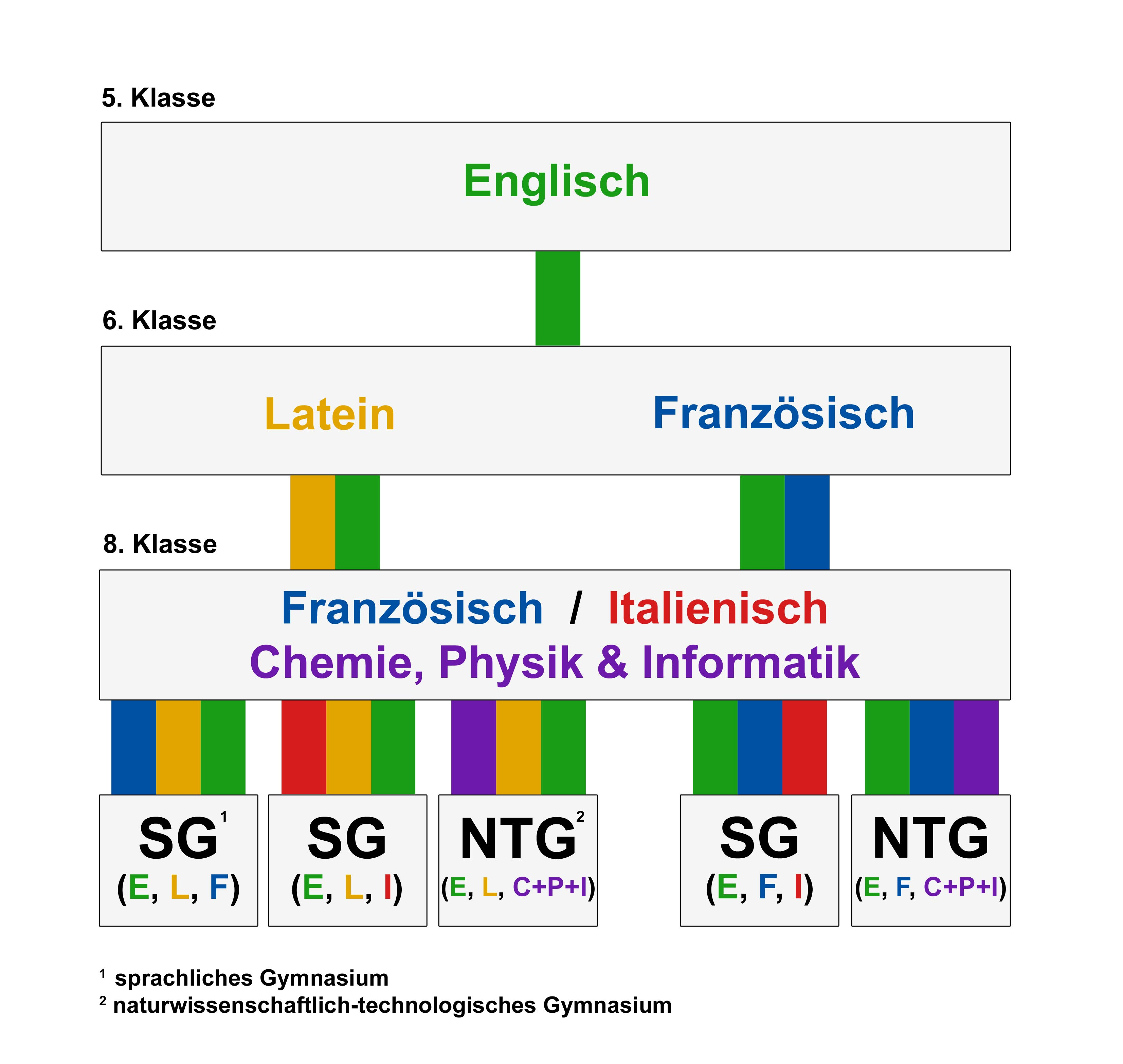 Wahlmöglichkeiten des naturwissenschaftlich-technologischen und sprachlichen Zweiges des Platen-Gymnasiums.